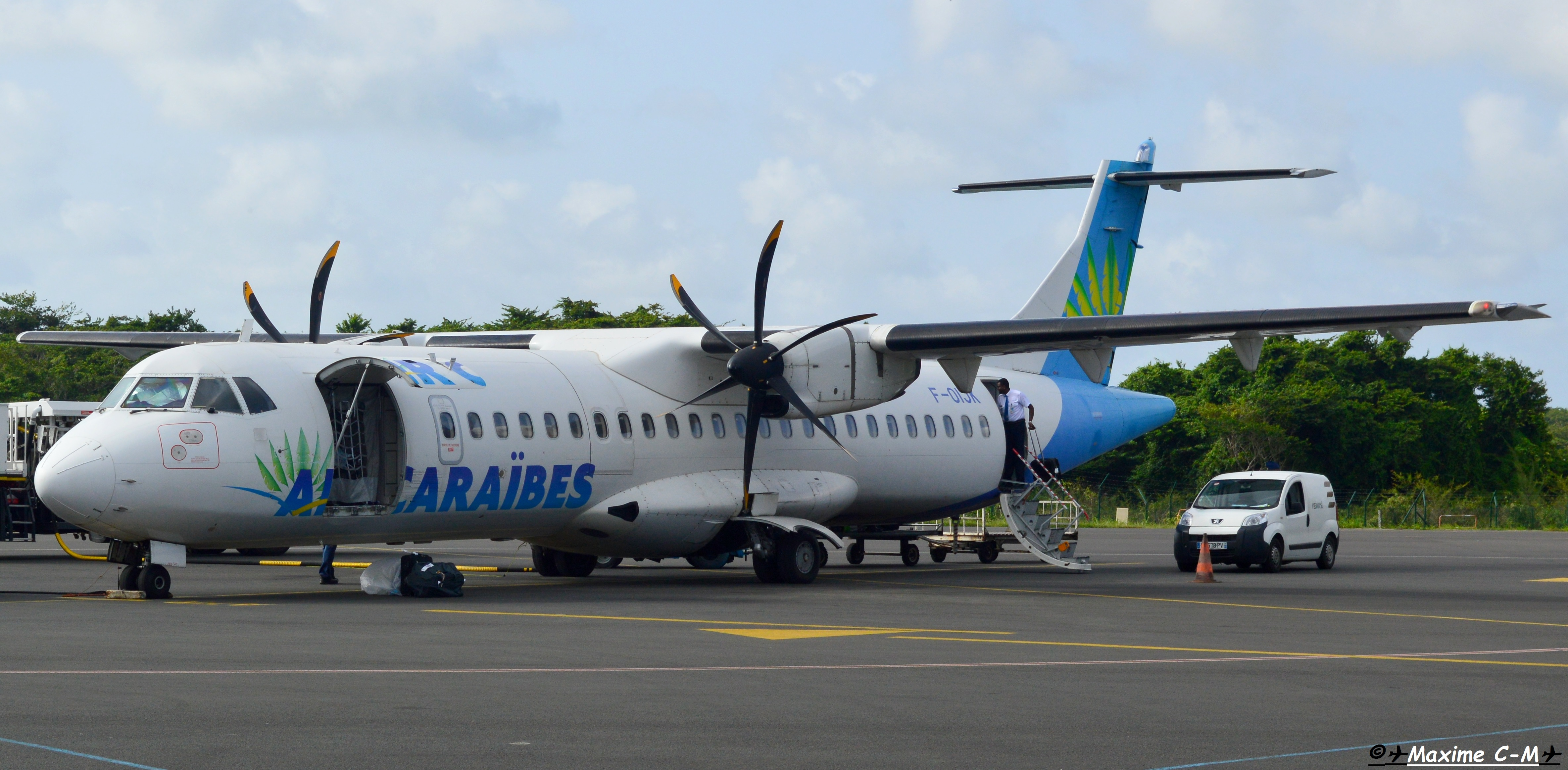 Refueling